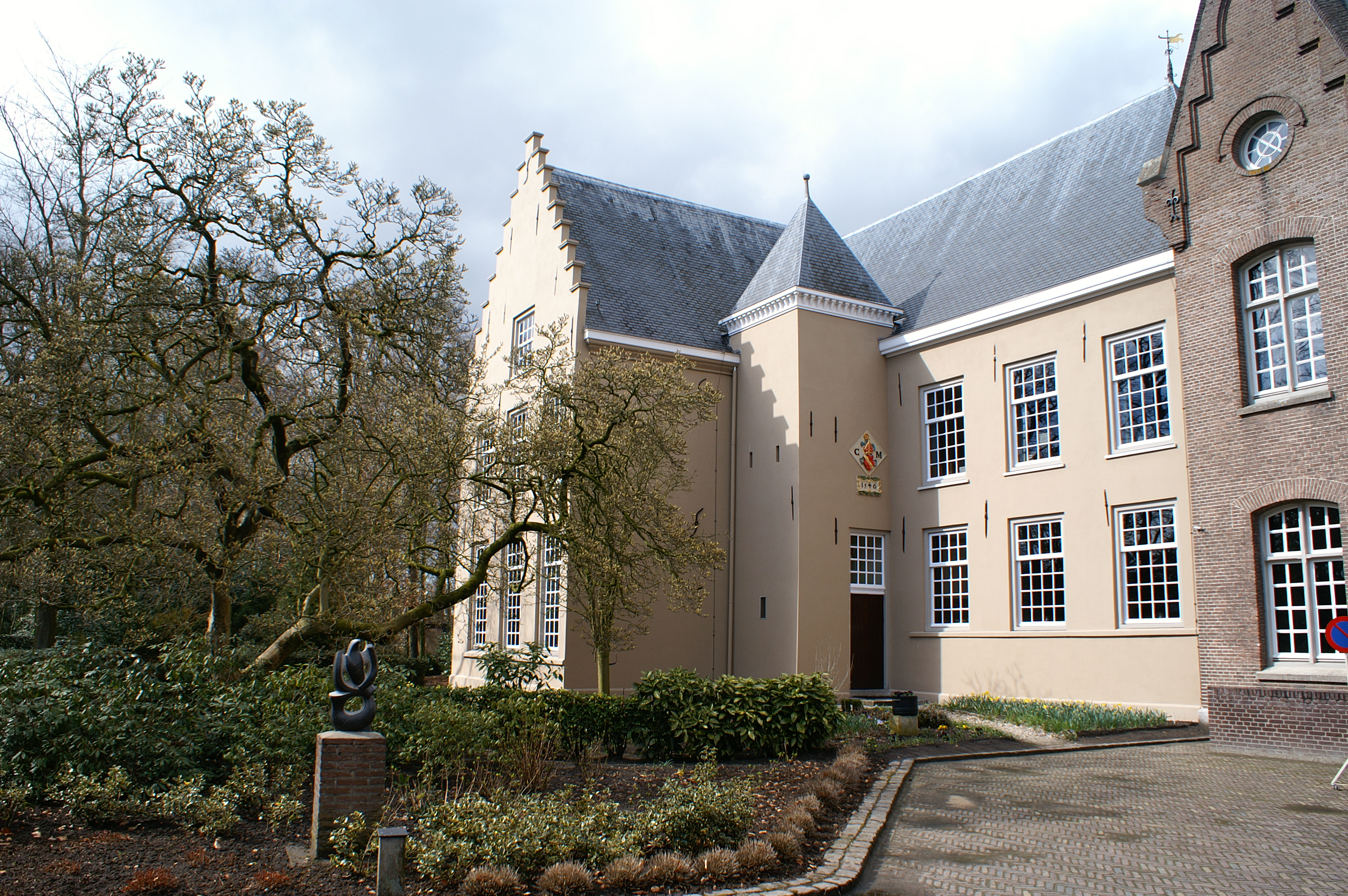 Slot Berne te Heeswijk-Dinther.